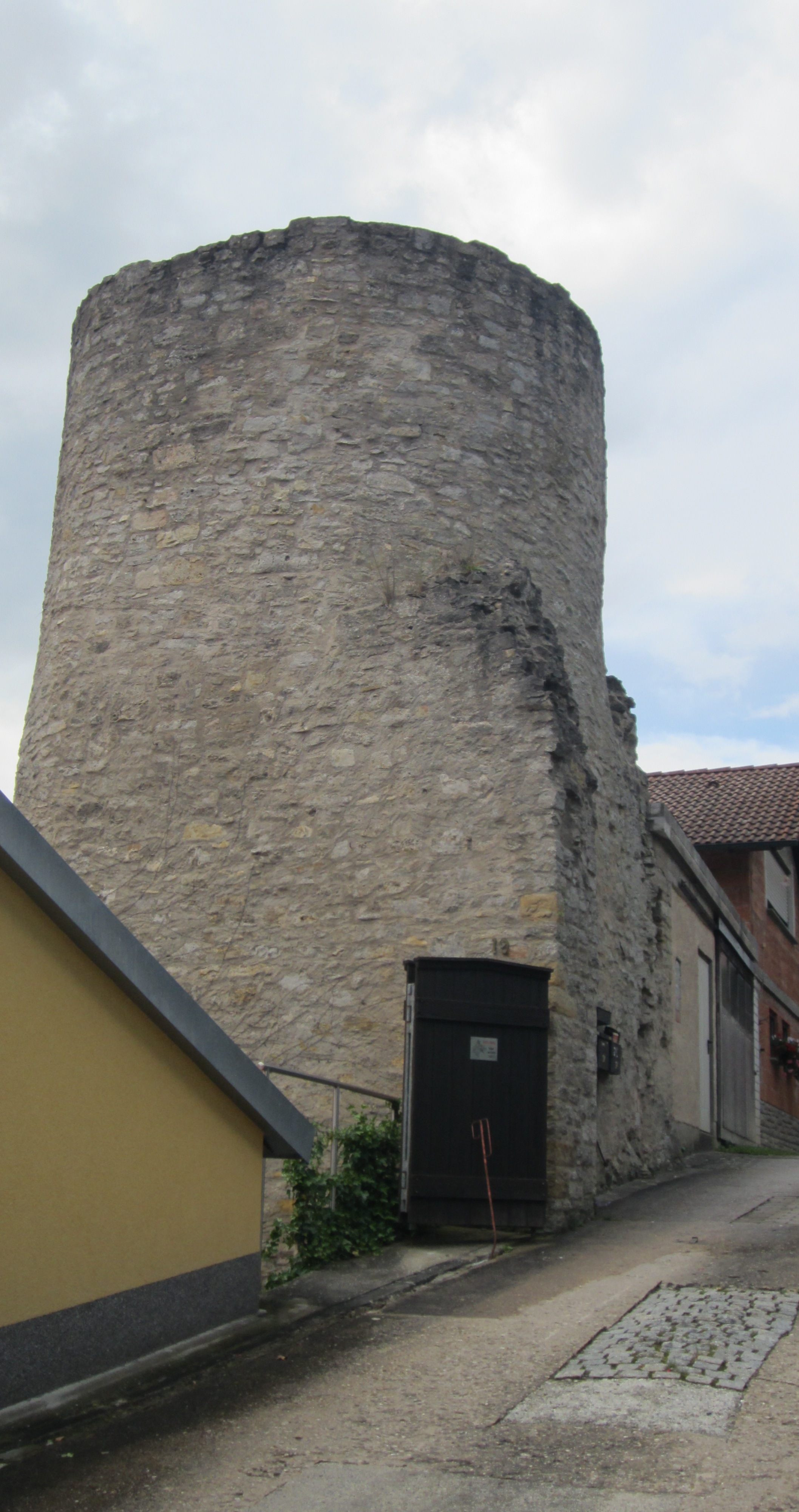 Burgruine in Marktsteinach